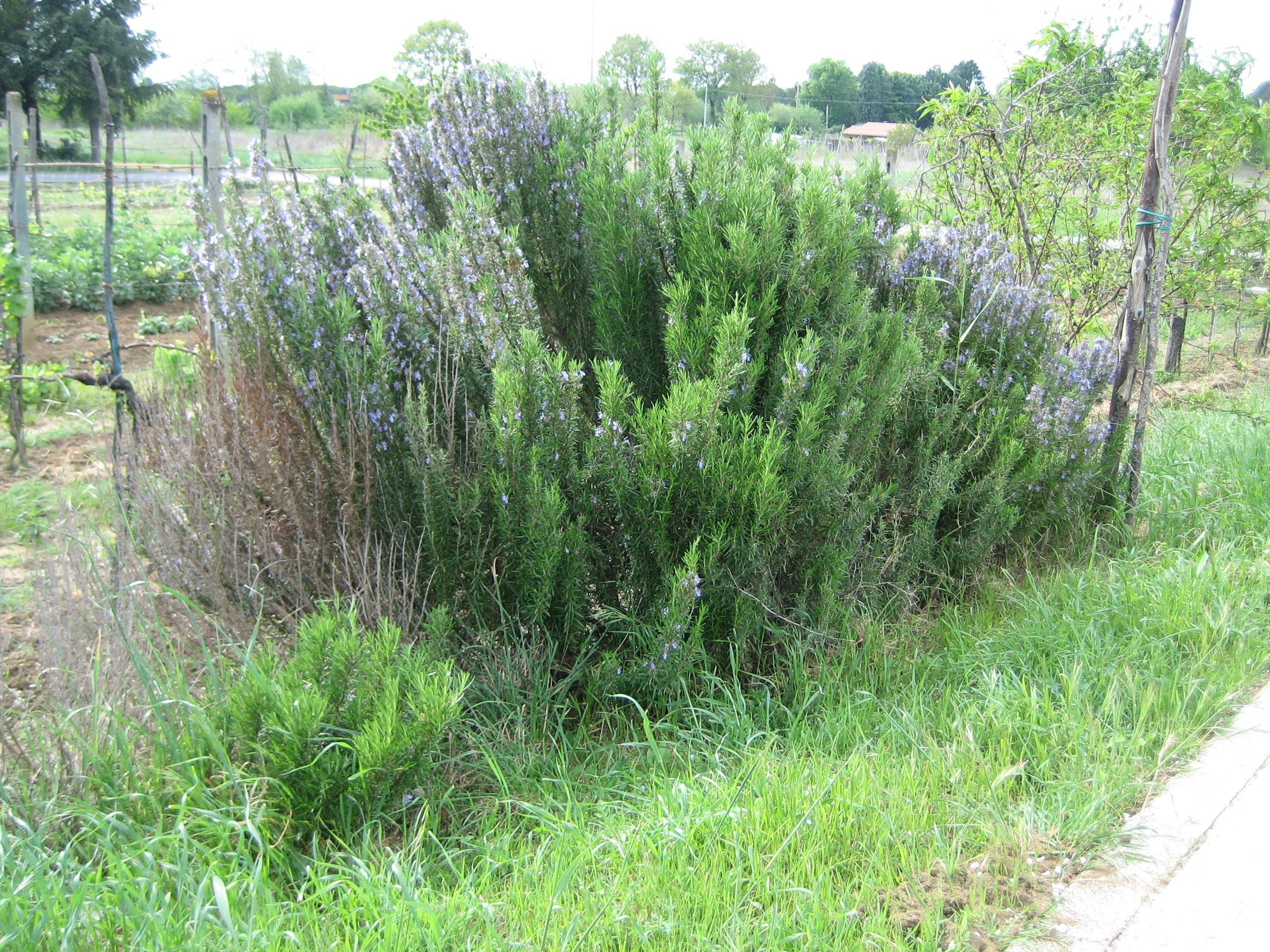 wilder Rosmarinbusch in Umbrien